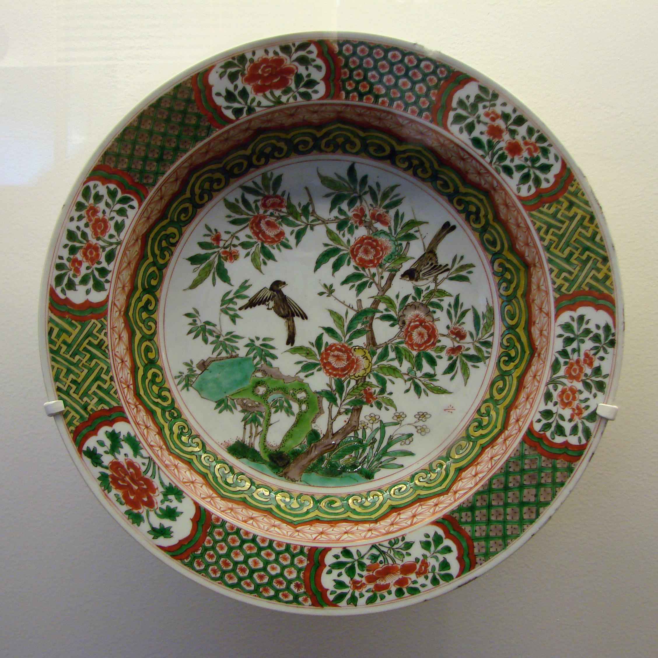 Plat à décor de fleurs et d'oiseaux, dynastie Qing, période Kangxi (1662-1722), porcelaine "famille verte". Musée Guimet, Paris.